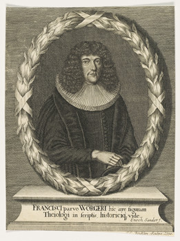 Porträt des Lübecker Theologen Franz Wörger (1647-1708).